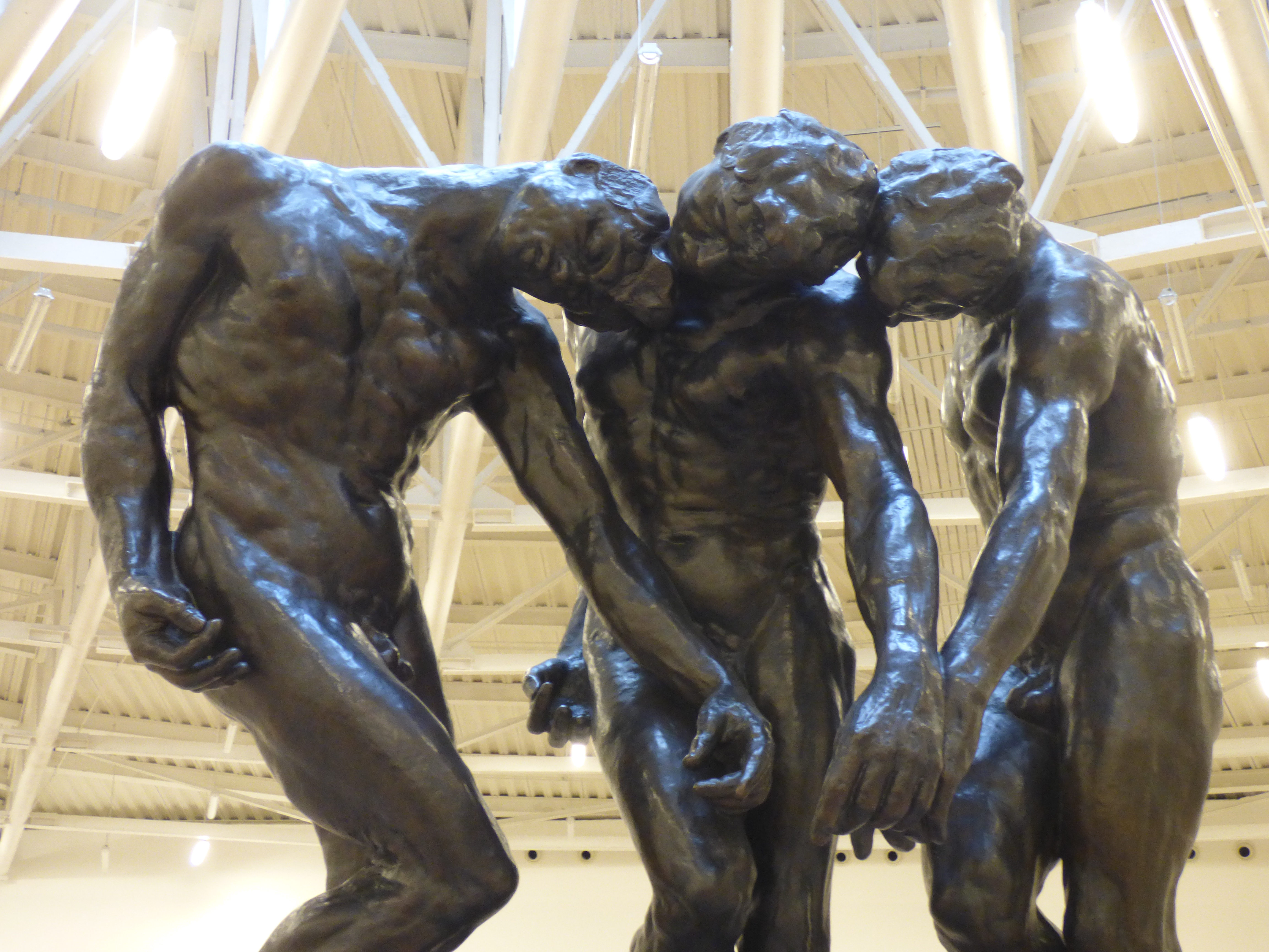 Las Tres Sombras (1880) de Auguste Rodin en el Museo Soumaya. Bronce con patina café y negra